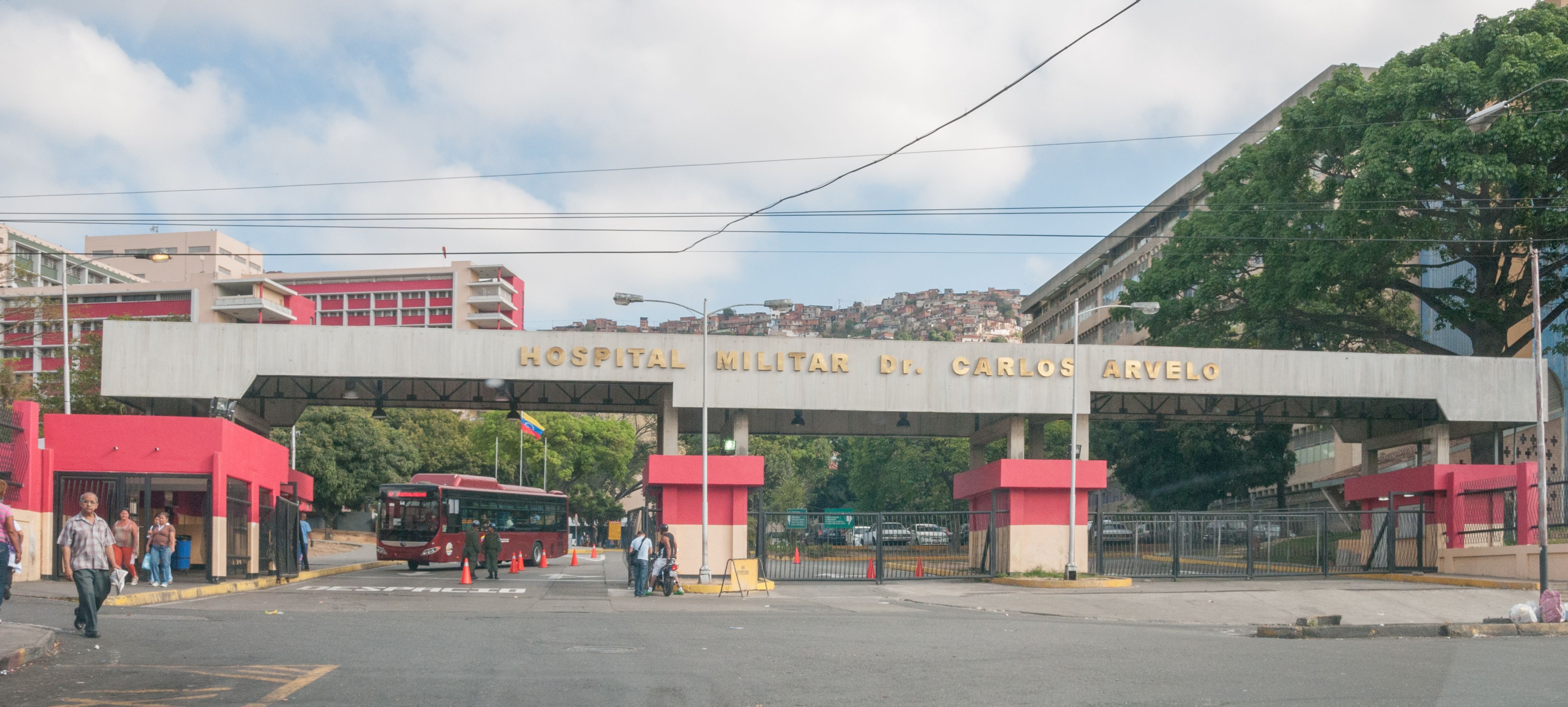 Hospital Clínico Militar de Caracas